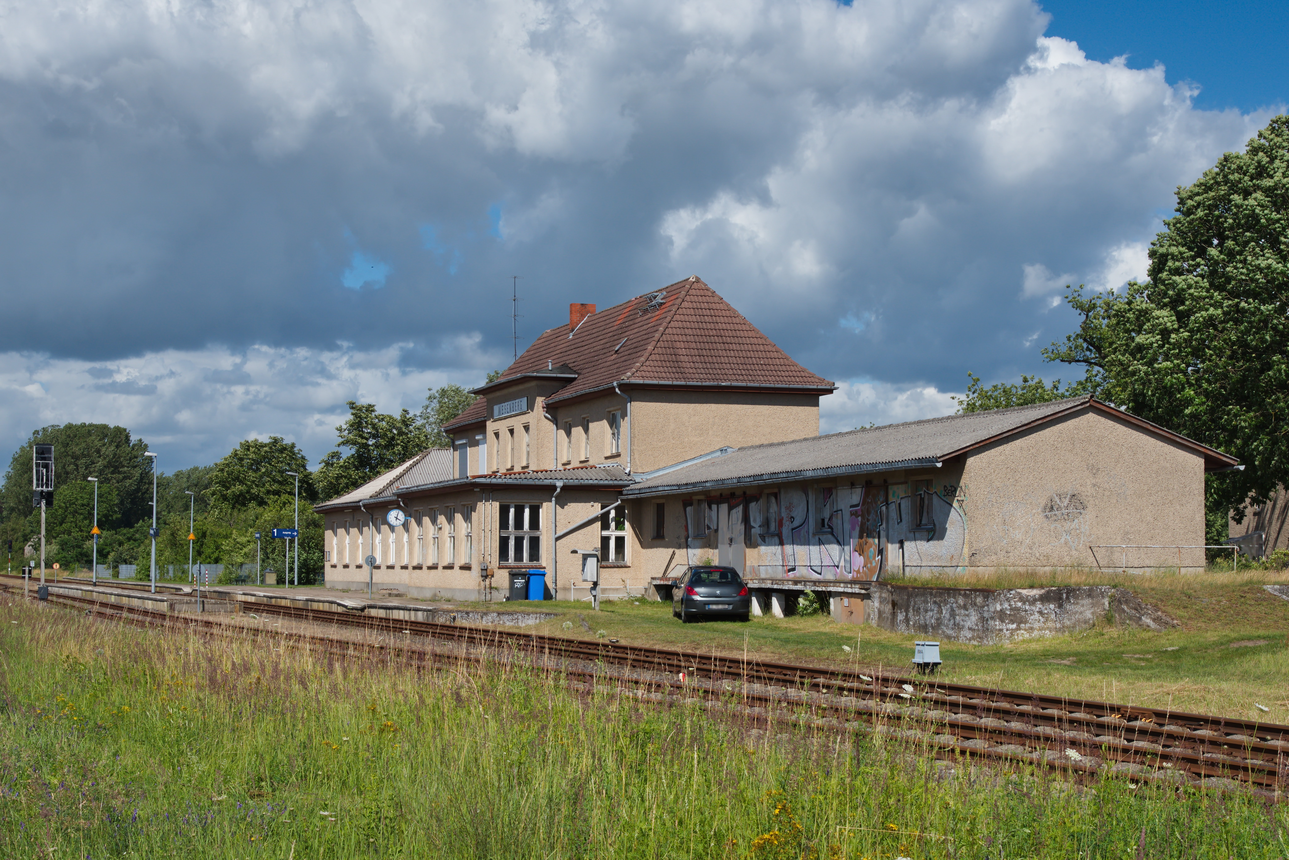 Blick auf das Empfangsgebäude vom Bahnhof Wesenberg, Blickrichtung Neustrelitz.